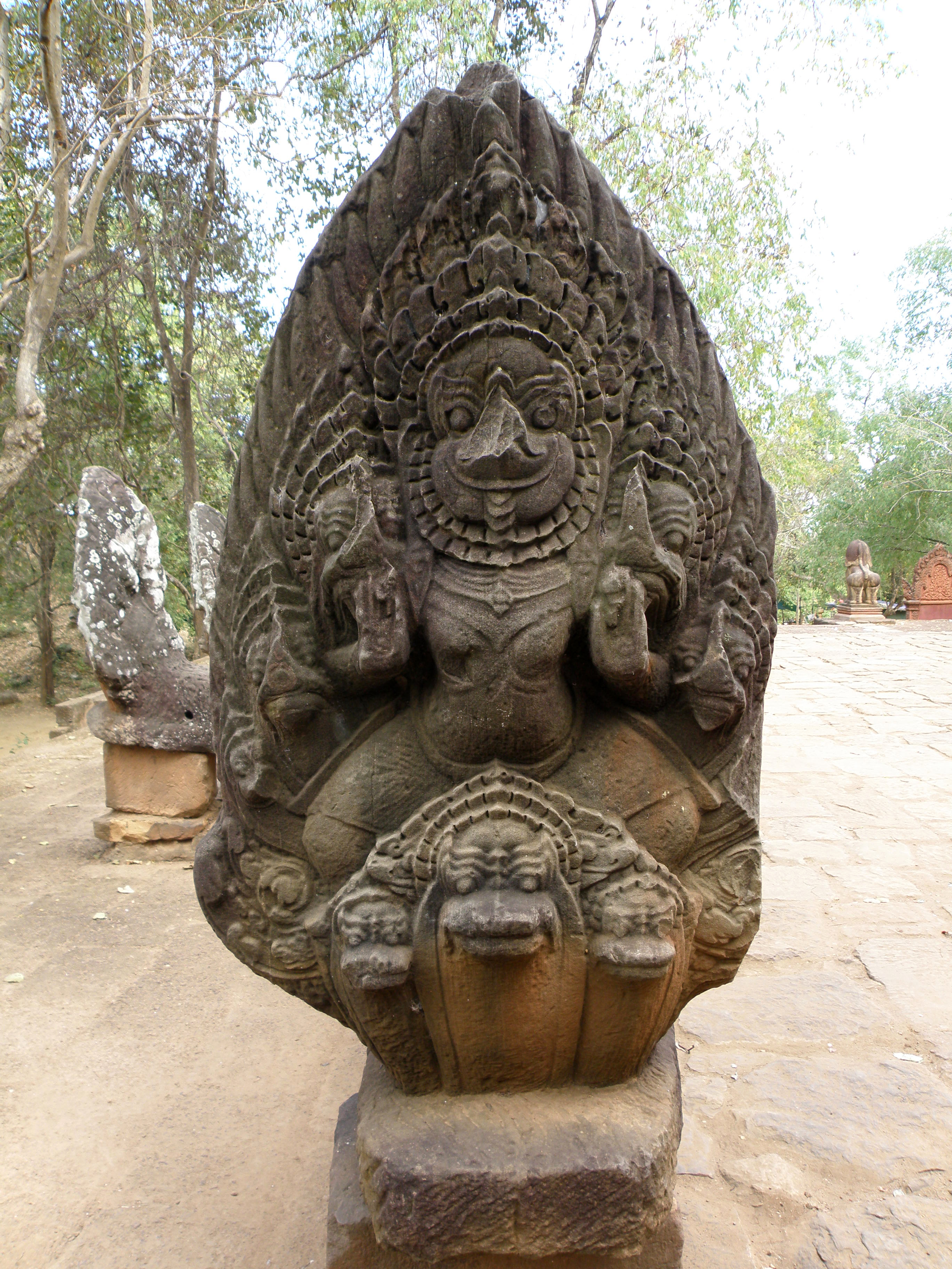 Cambodge - Battambang - Wat Banan - Garuda chevauchant un Naga